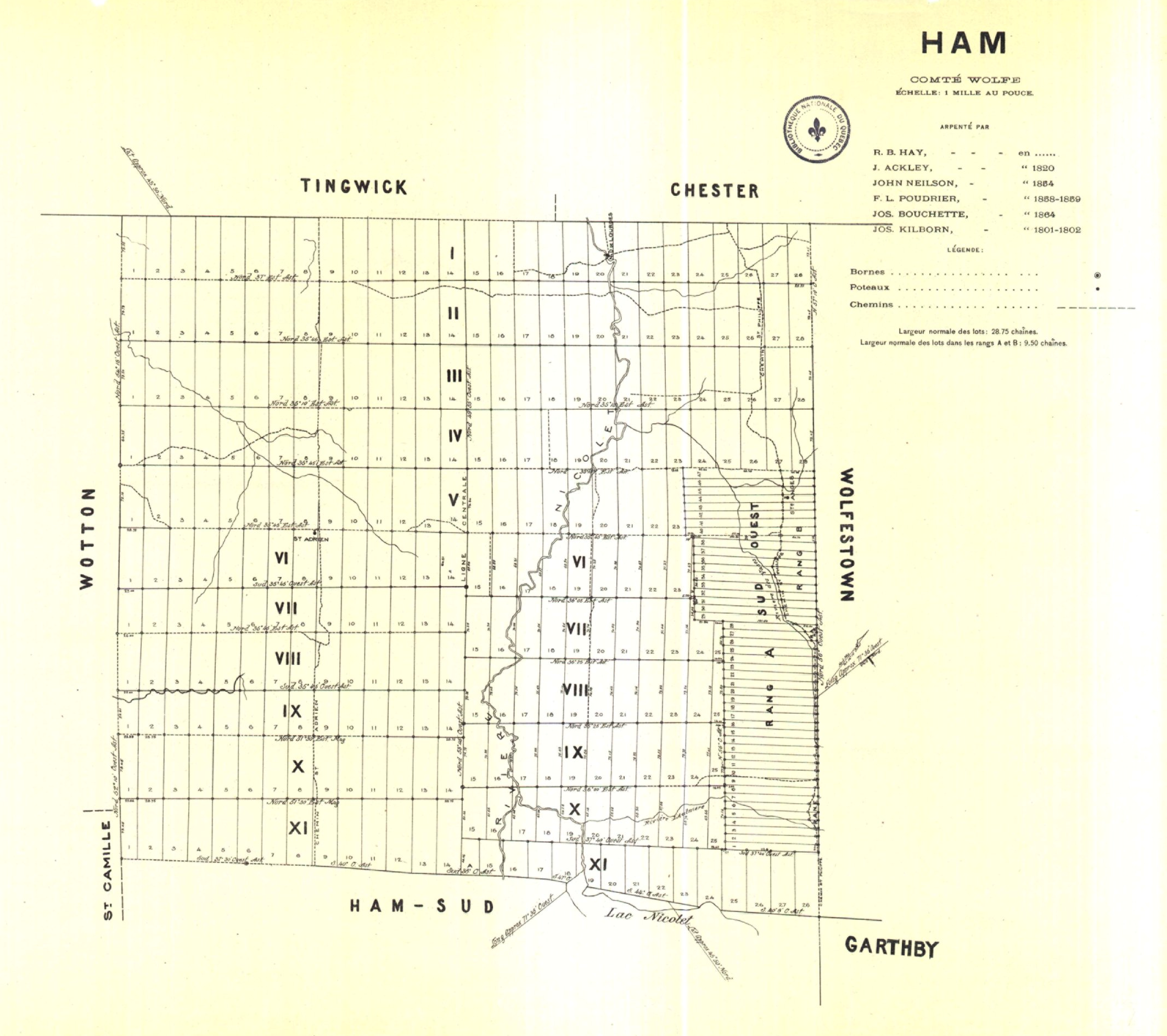 Cartes cadastrales de cantons du Québec Comté Wolfe, Ham